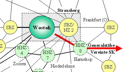 Einbindung der HNZ 8 in das Nachrichtensystem am Beispiel des Sondernetzes 1